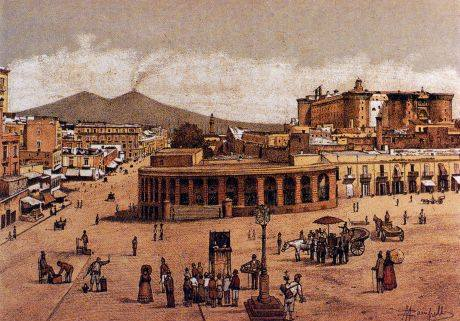 Napoli, attuale Piazza Municipio prima dell'abbattimento dei bastioni aragonesi. Autore sconosciuto.